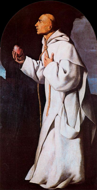 El Beato John Houghton // Museo de Bellas Artes de Cádiz. Cádiz. España.